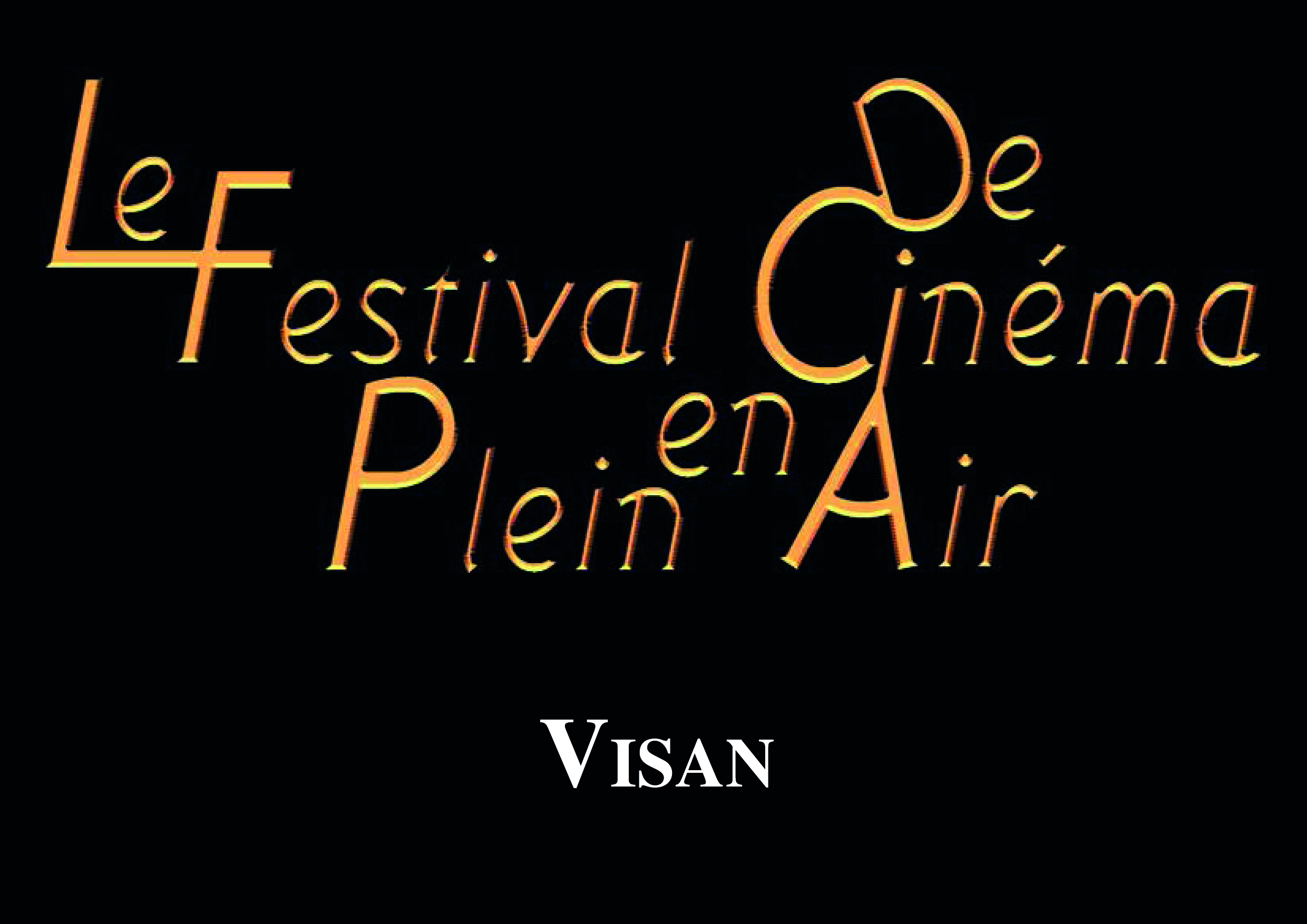 nouveau logo du festival de cinema en plein air